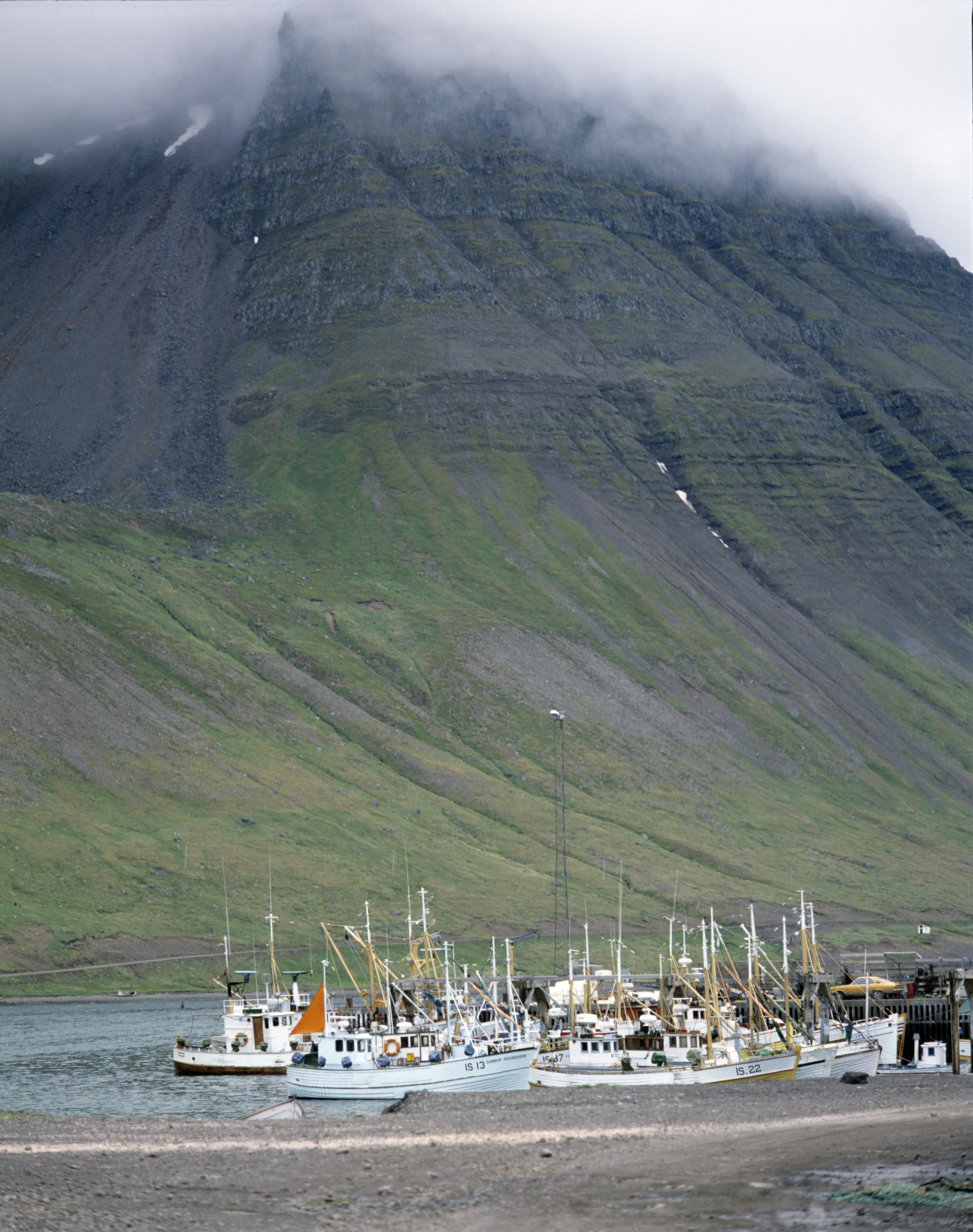 Hafen von Ísafjörður.